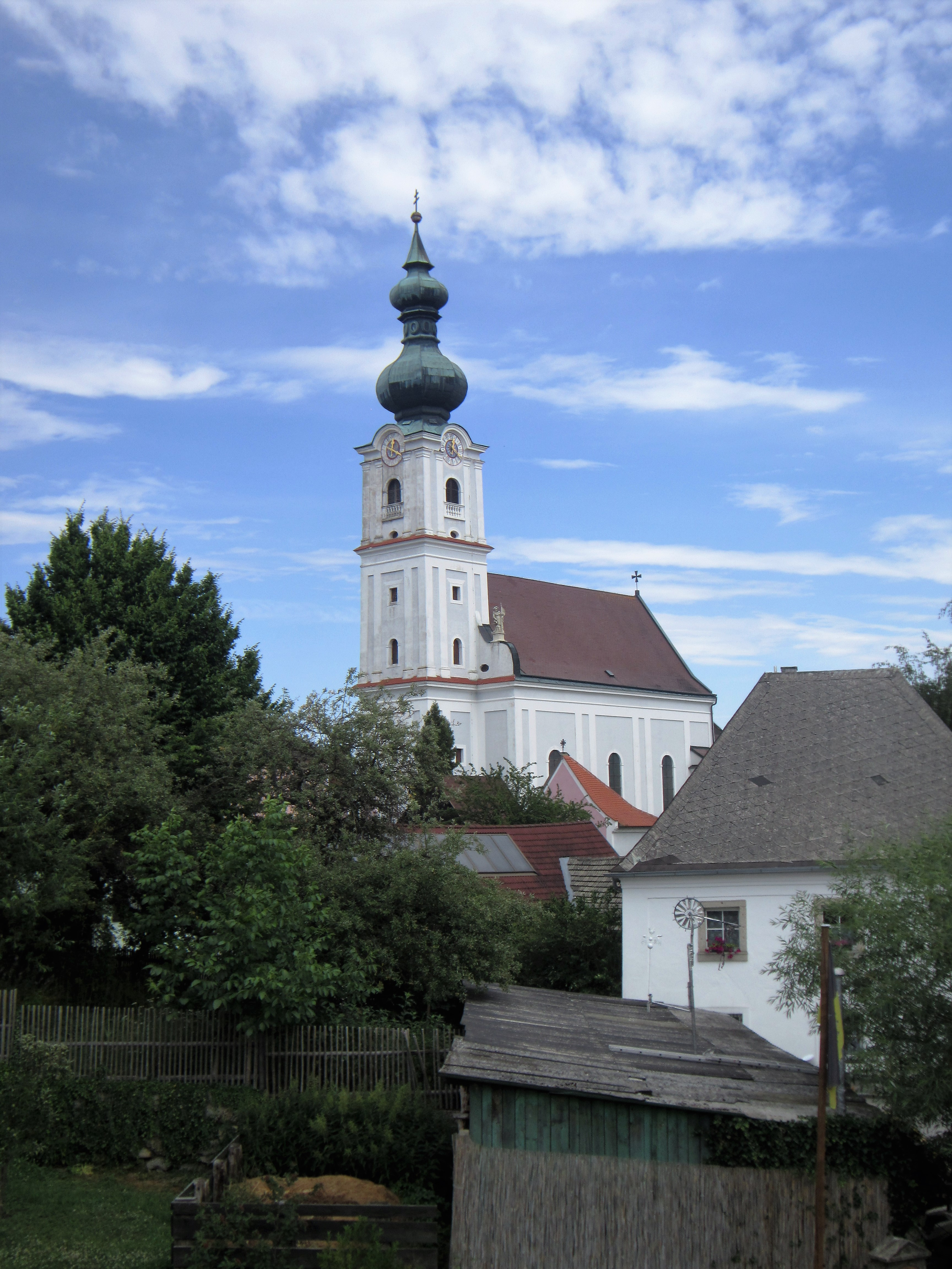 Farní kostel v Kirchbergu am Walde